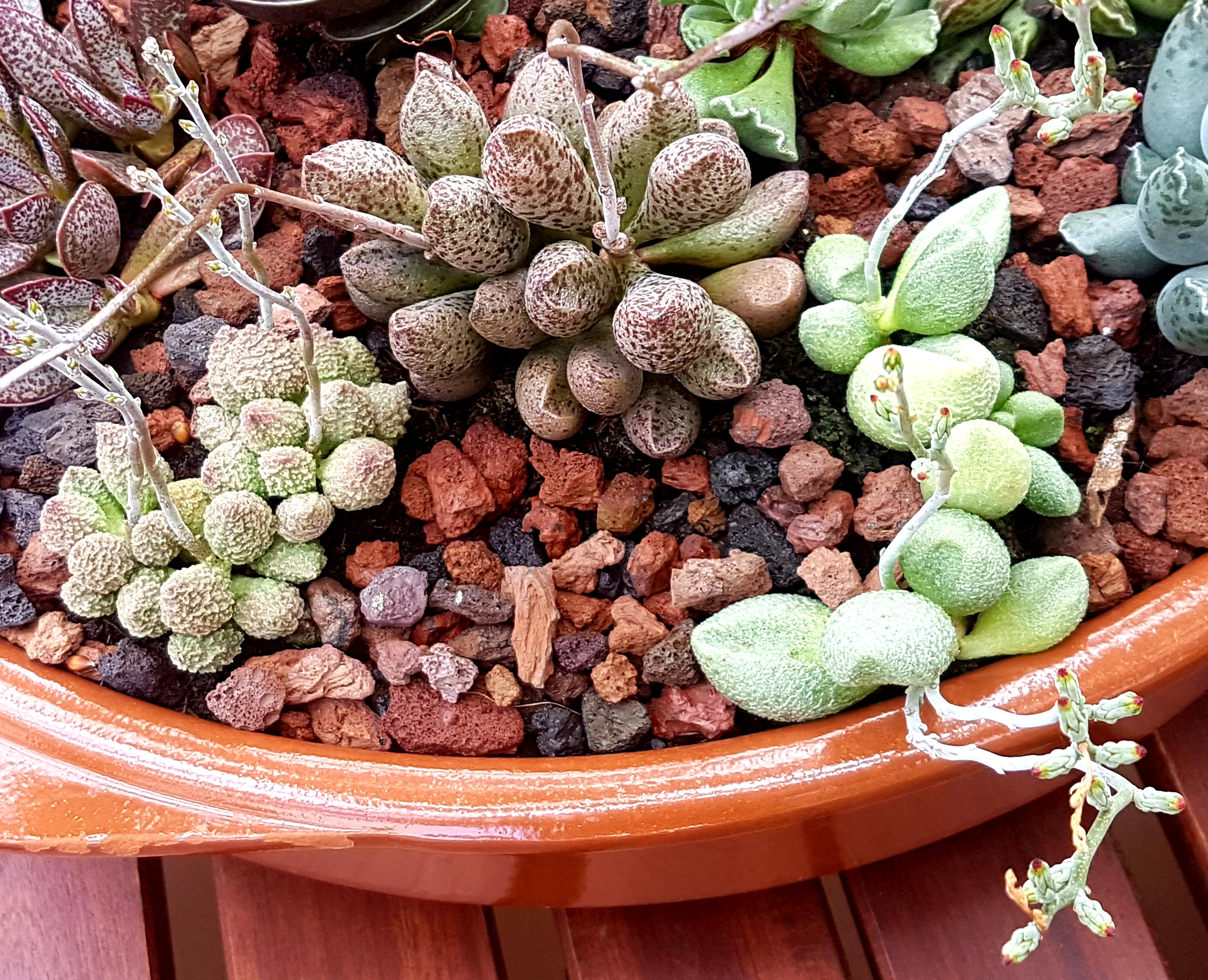 Tres varietats d'A. marianae